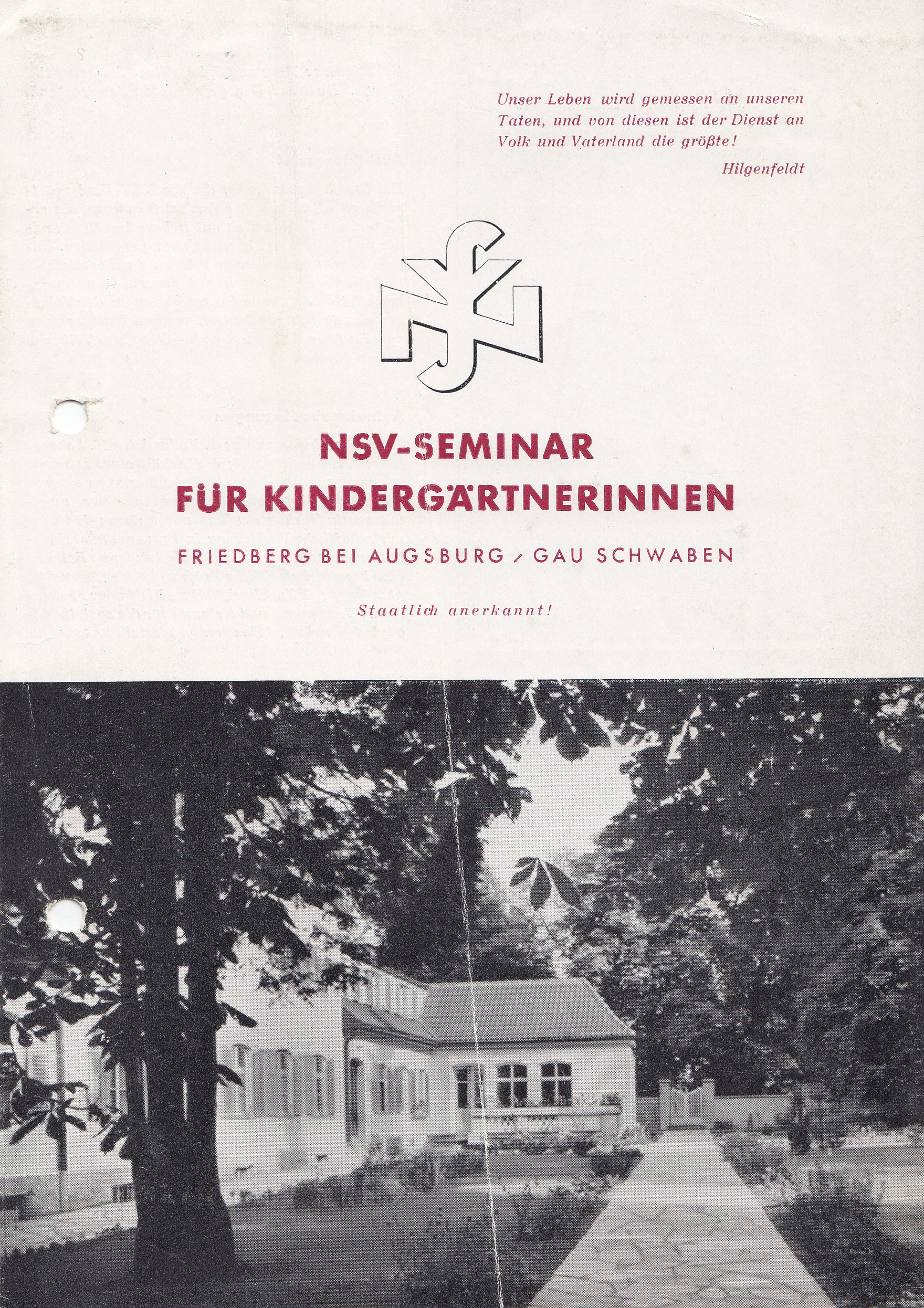 Schulprospekt NSV.-Seminar Friedberg bei Augsburg